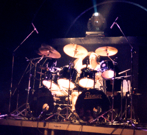 Thomen Stauch beim letzten ANATO-Tour-Gig in Athen (Silo)